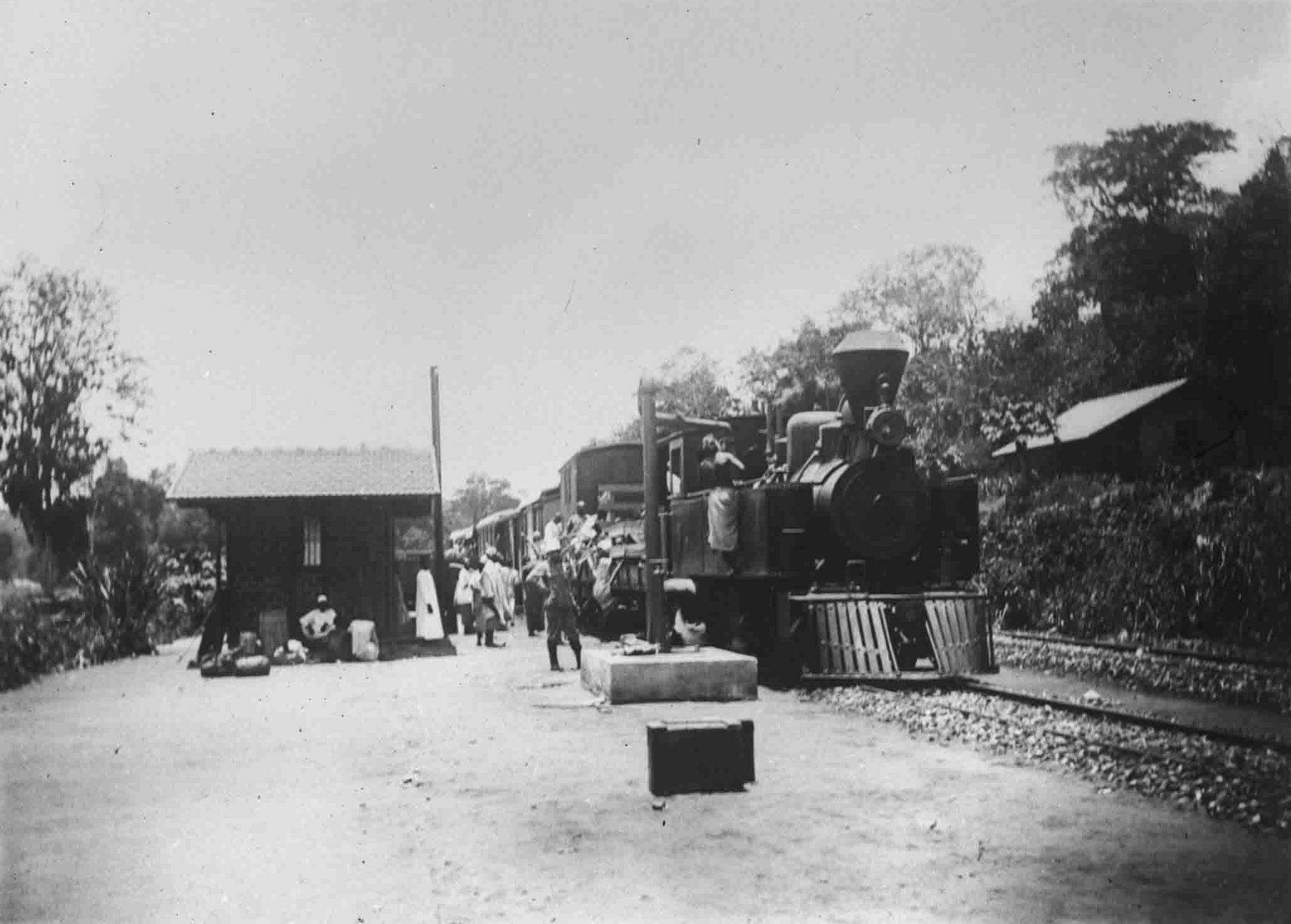 Oehlerking-Sammlung - Allg. III 18 / Station Kiuhuhwi "Usambarabahn". Standort: StuUB Bildnummer: 002-0108-18 CD-Code: CD/3317/2014/0627/3317_2014_0627_0019 Text auf dem Bild: Allg. Oehl. 18. / Allg. 3. 18. Text auf der Hülle: Allg. III 18 / Station Kiuhuhwi "Usambarabahn".